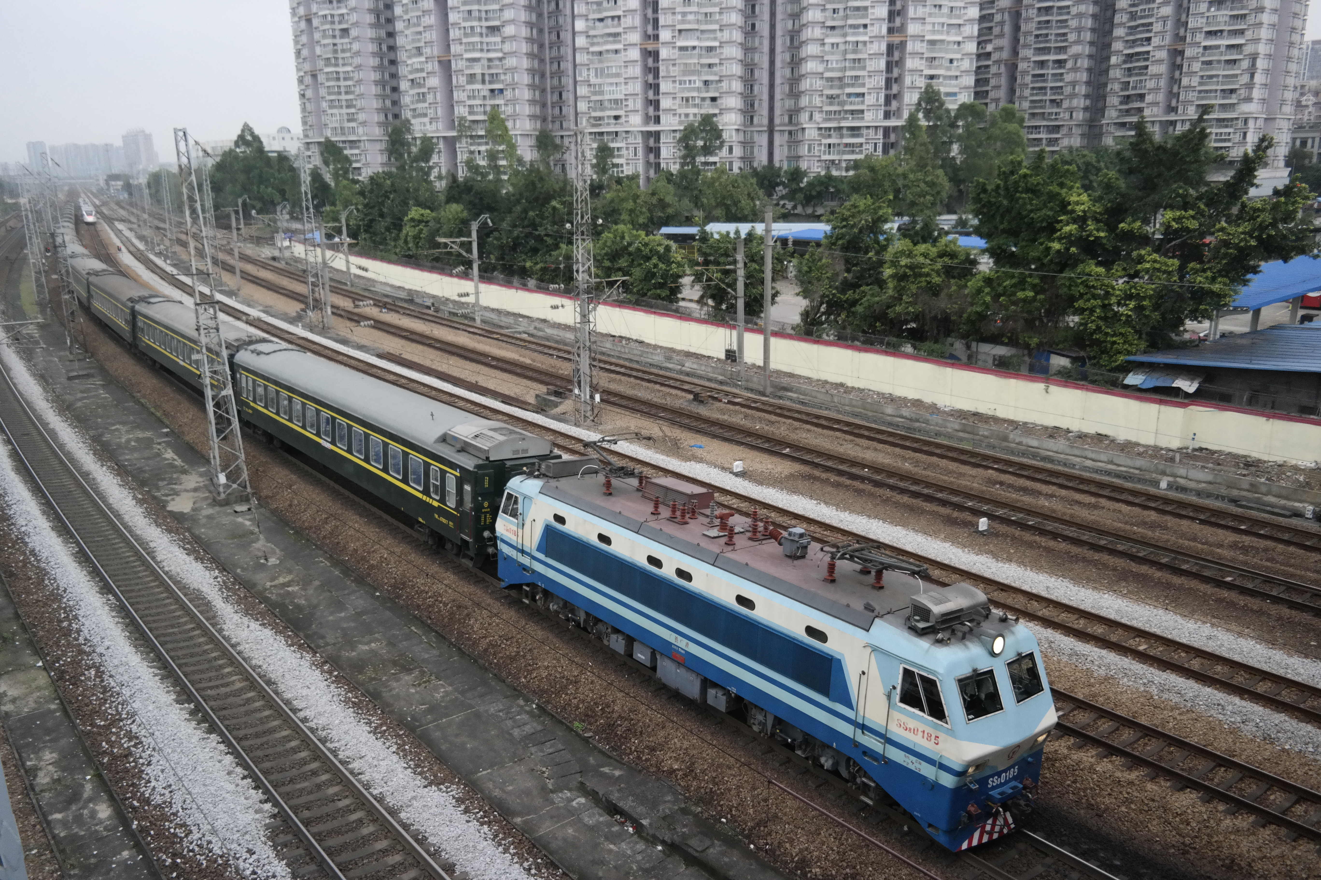 中文（中国大陆）: SS8 K1208 深圳东到昆明拍摄于广园快速路人行天桥